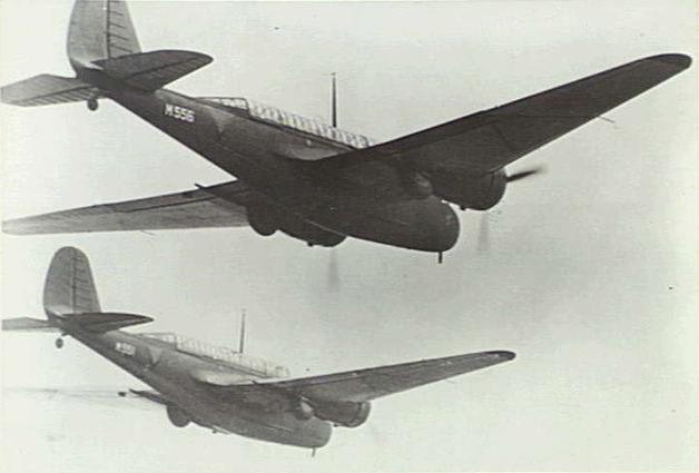 Two Royal Netherlands East Indies Army Air Force (Militaire Luchtvaart van het Koninklijk Nederlands-Indisch Leger, ML-KNIL) Martin 166 (139WH) bombers in flight over Malaya, in January 1942.